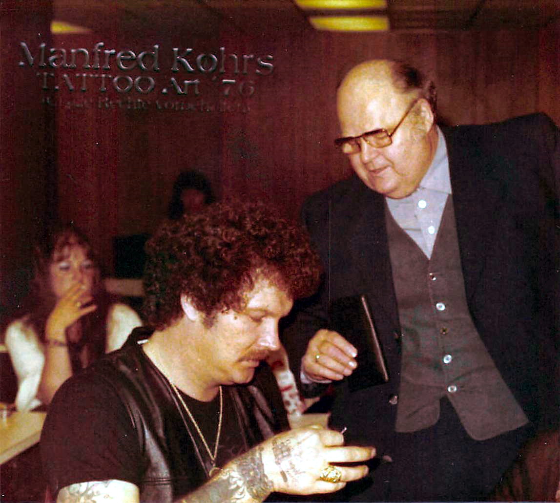 David Yurkew & Samy Streckenbach auf der tattoo Convention in Blackpool 1979